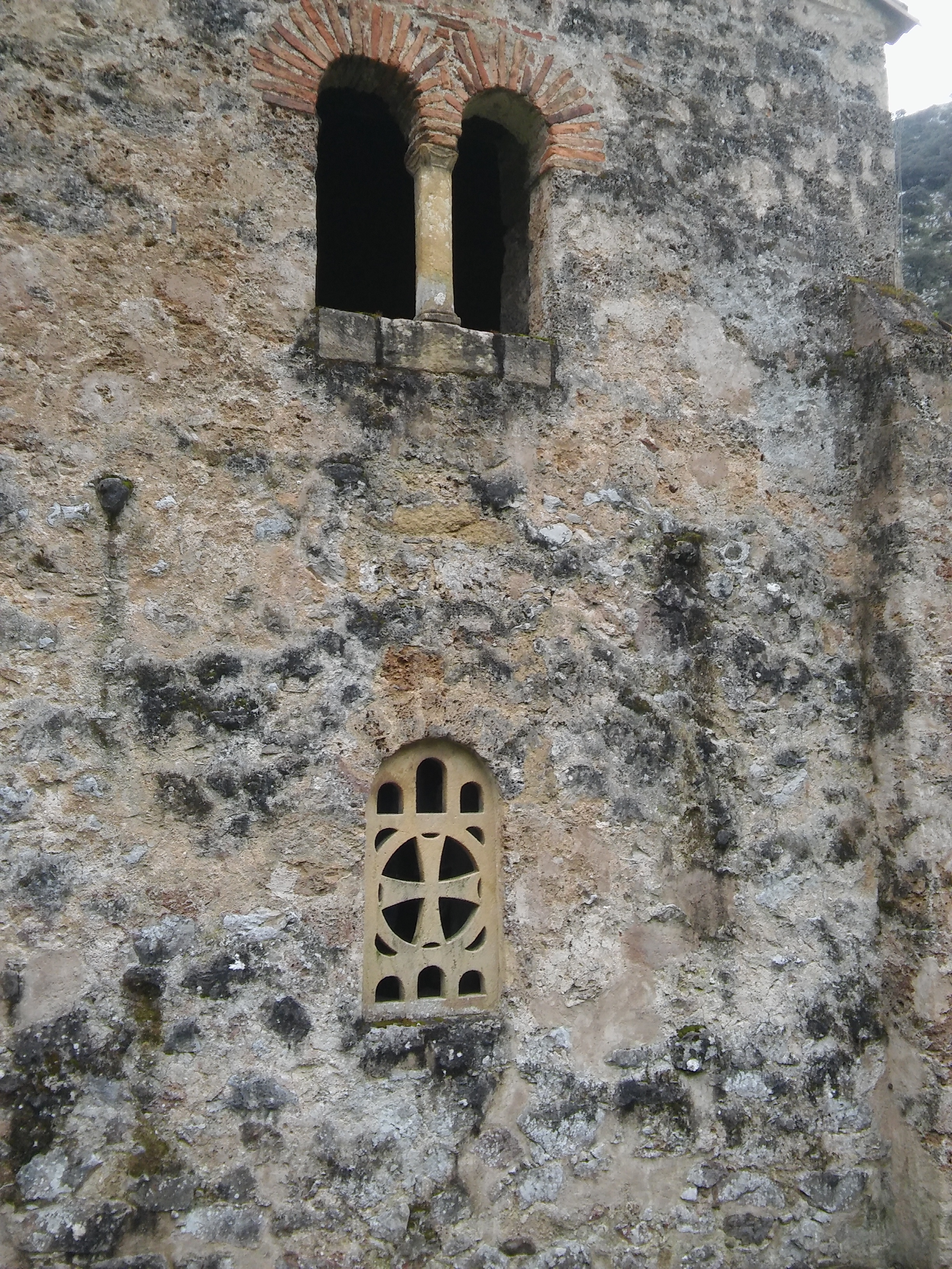 Detalle de óculos geminado de la Iglesia